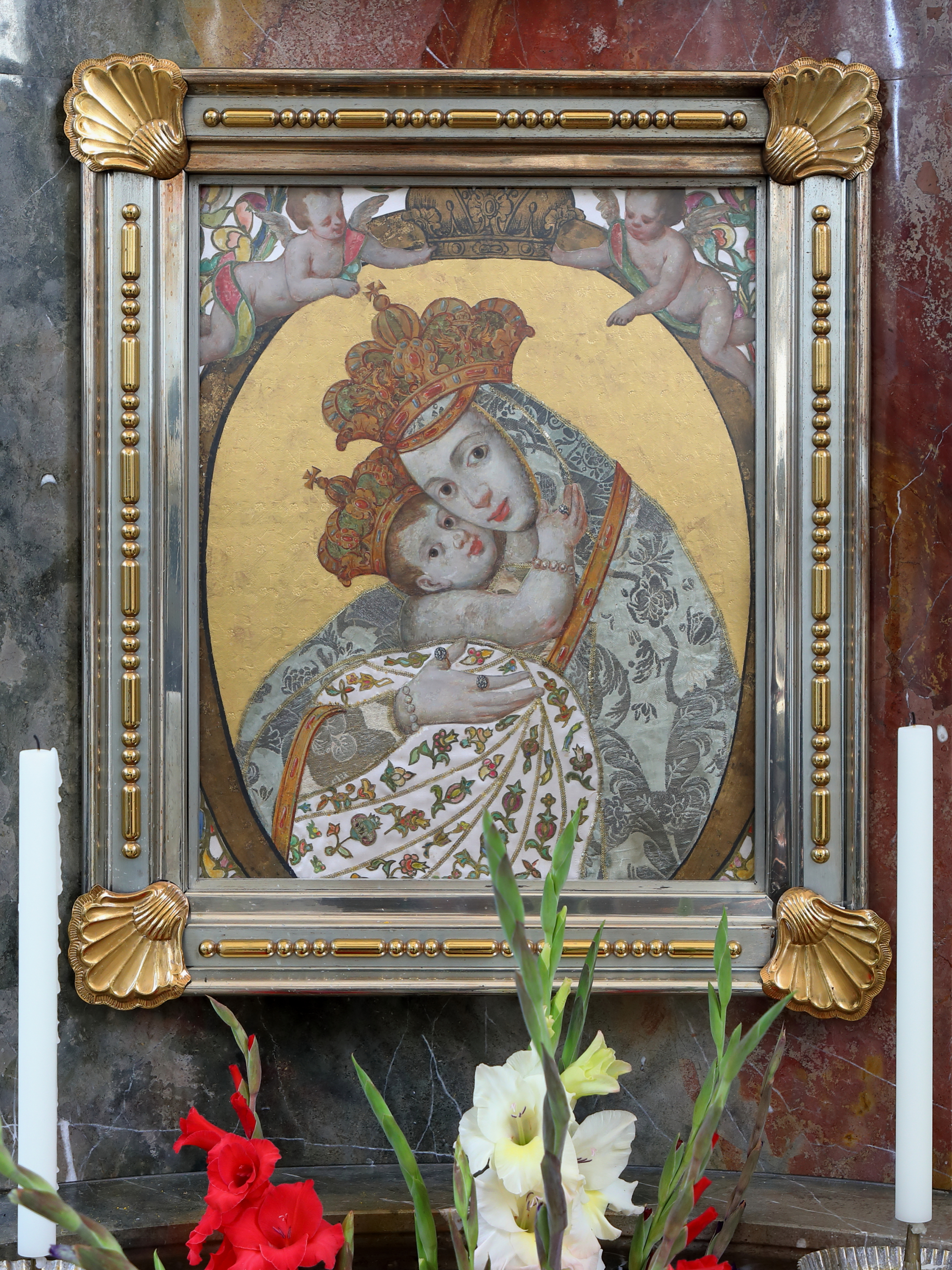 Gnadenbild in der Wallfahrts- und Pfarrkirche Mariä Geburt in Maria Roggendorf, ein Ortsteil der niederösterreichischen Marktgemeinde Wullersdorf.Das auf Leder gemalte Gnadenbild soll vom Verwalter des Raffelhofs gestiftet worden sein (um 1450). Am 14. September 1969 wurde das restaurierte Gnadenbild auf Initiative des damaligen Religionsprofessors in Hollabrunn und späteren Erzbischofs von Wien, Hans Hermann Kardinal Groër, neu aufgestellt und geweiht. Damit wollte Groër einen Neubeginn der Wallfahrt forcieren.